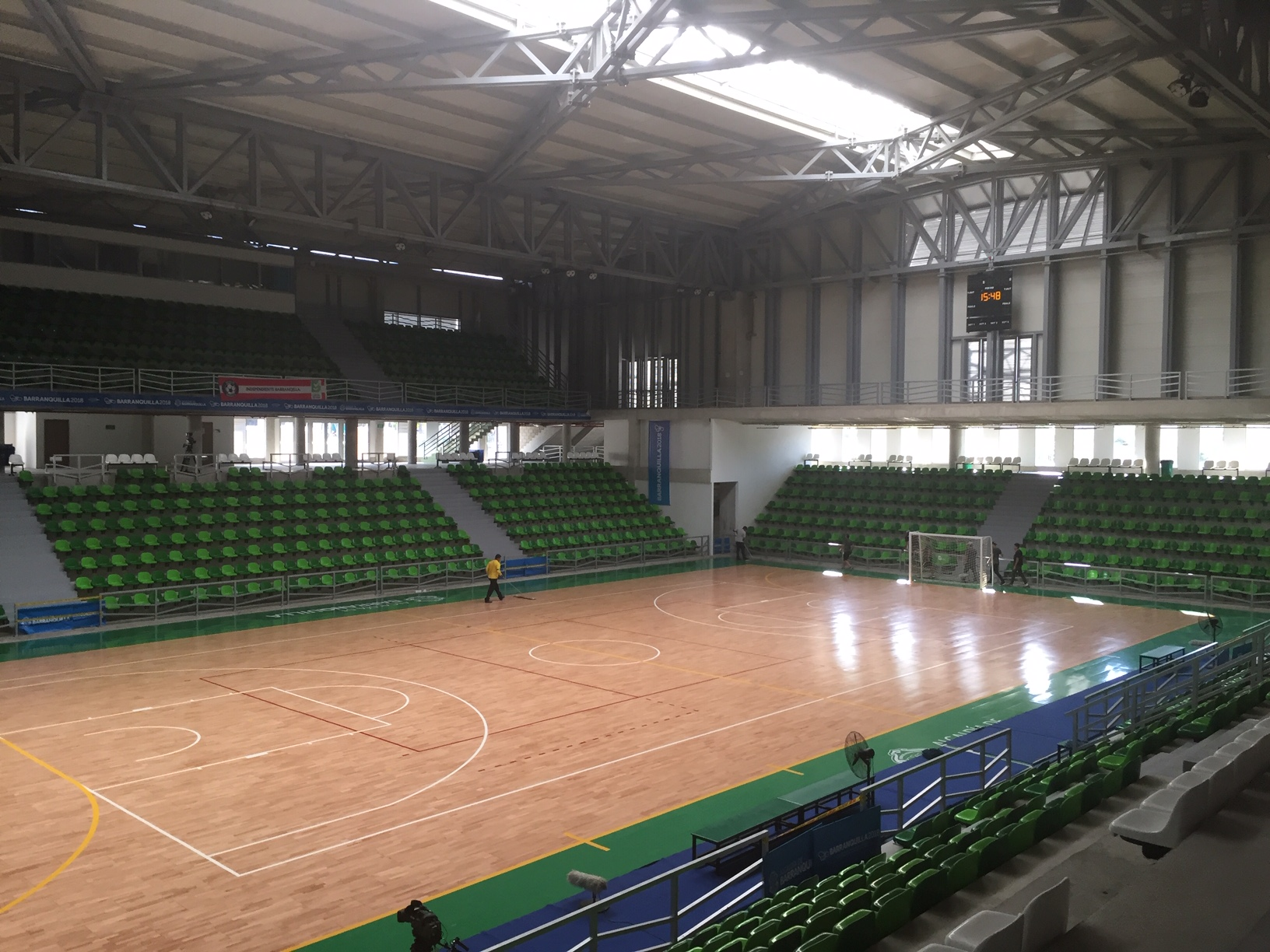 Interior del Palacio de Combates de Barranquilla